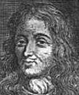 Partie du portrait de d'Artagnan figurant en fronticide de l'édition 1704 de ses mémoires.